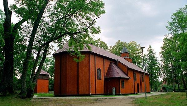 Studzieniczna, Polska